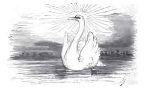 1860s Bertall